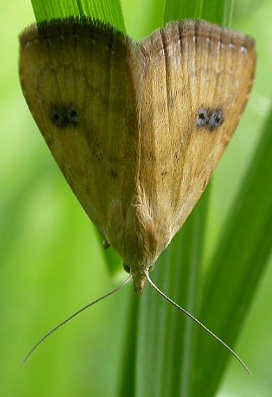 Rivula sericealis, Salles, Gironde, France